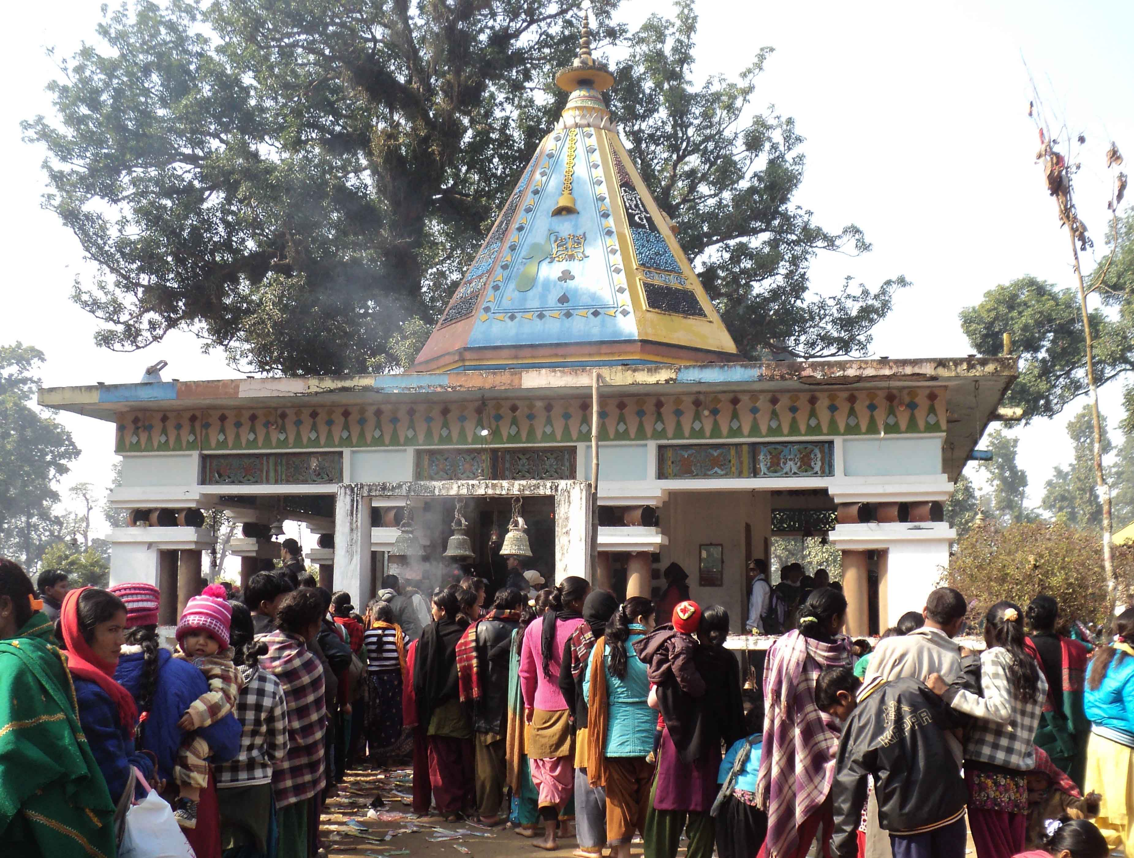 नेपाली: ठाकुरबाबाको मन्दिर परिसरमा लागेको मेला